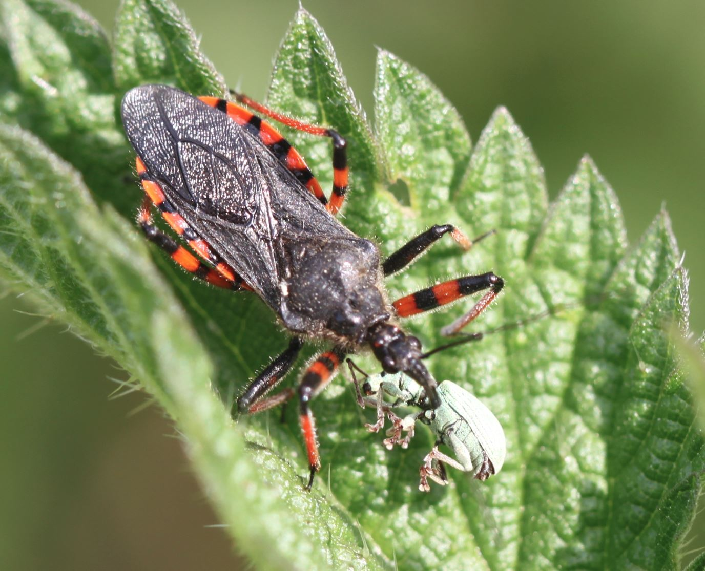 Geringelte Mordwanze (Rhynocoris annulatus) erbeutet einen Rüsselkäfer der Art Phyllobius virideaeris, am 18. Mai 2019 in der Schwetzinger Hardt